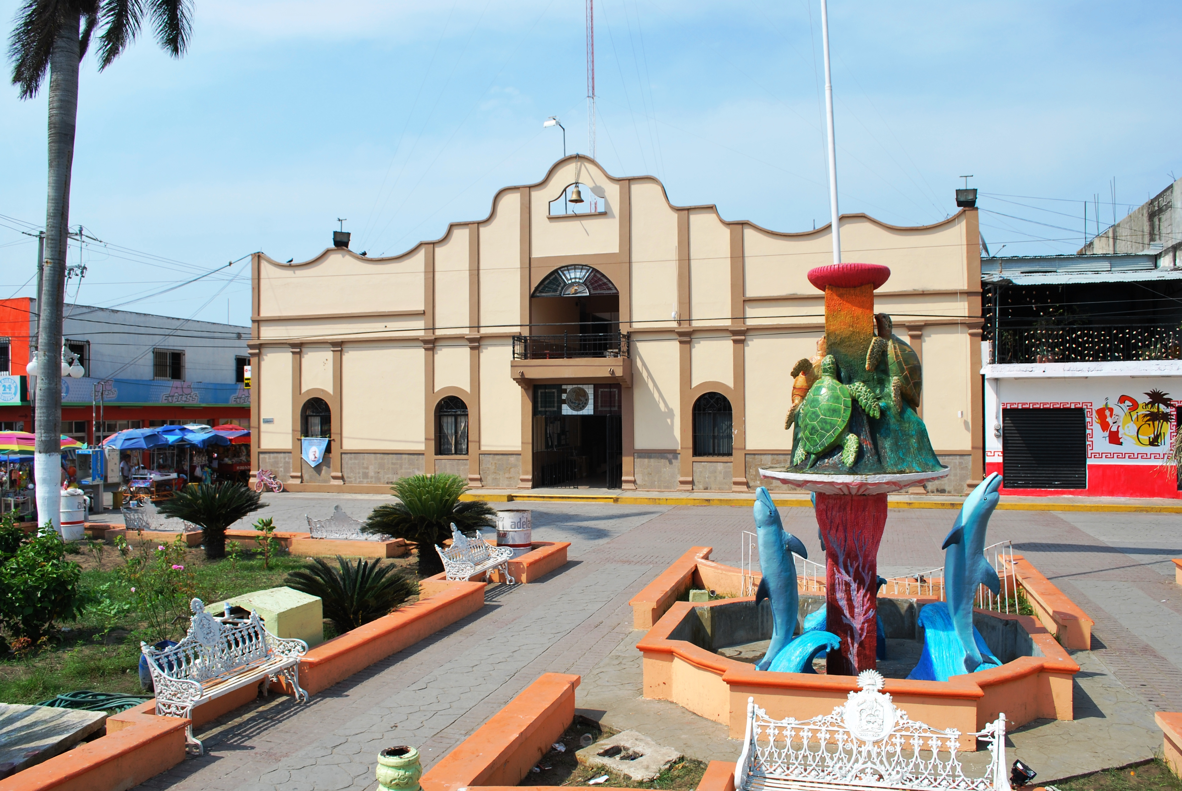 Fountain and municipal palace in Tecolutla, Veracruz